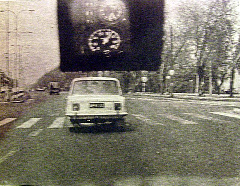 traffipax za szybą samochodu